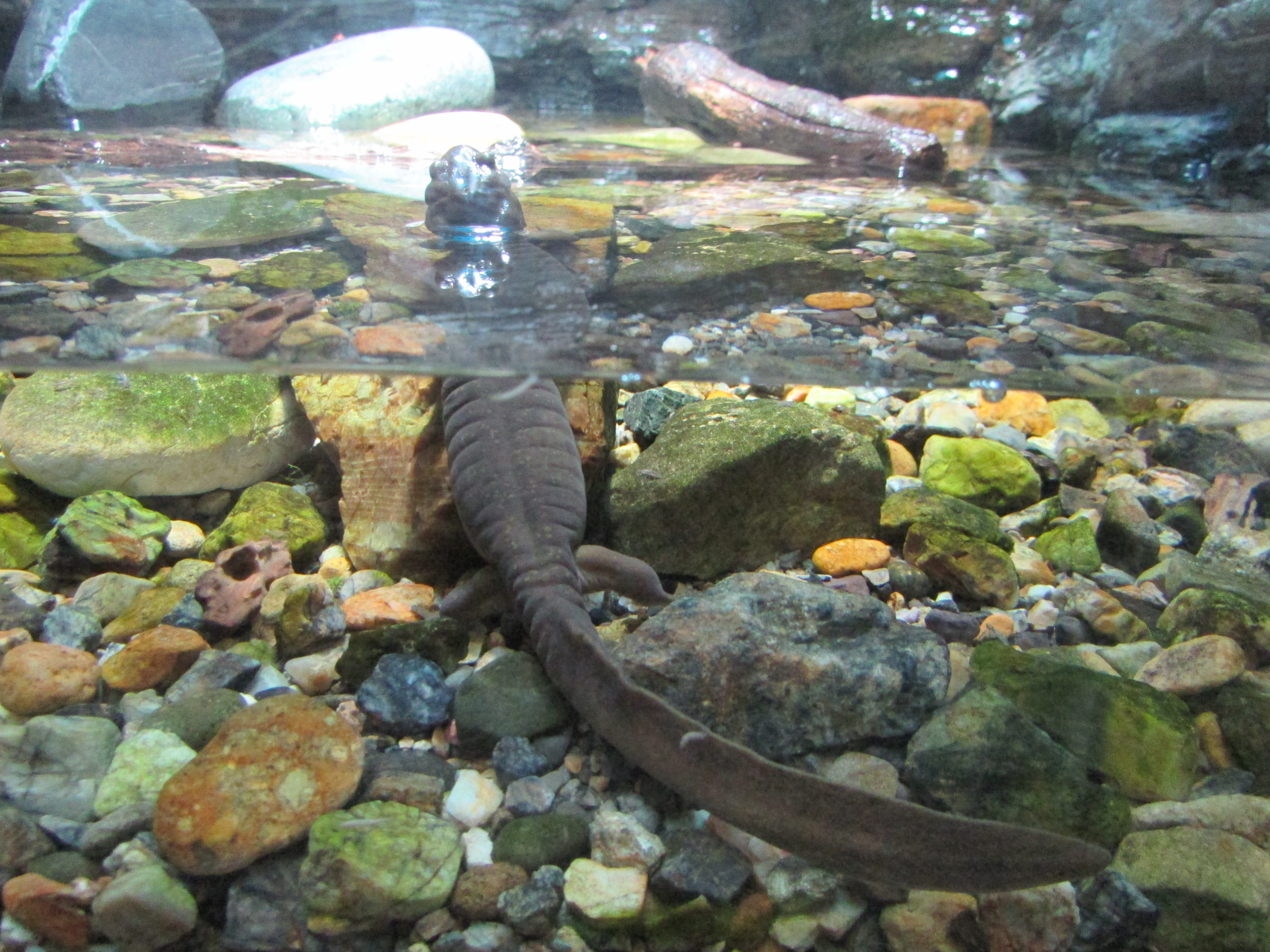 世界淡水魚水族館アクア・トトぎふのクロサンショウウオ